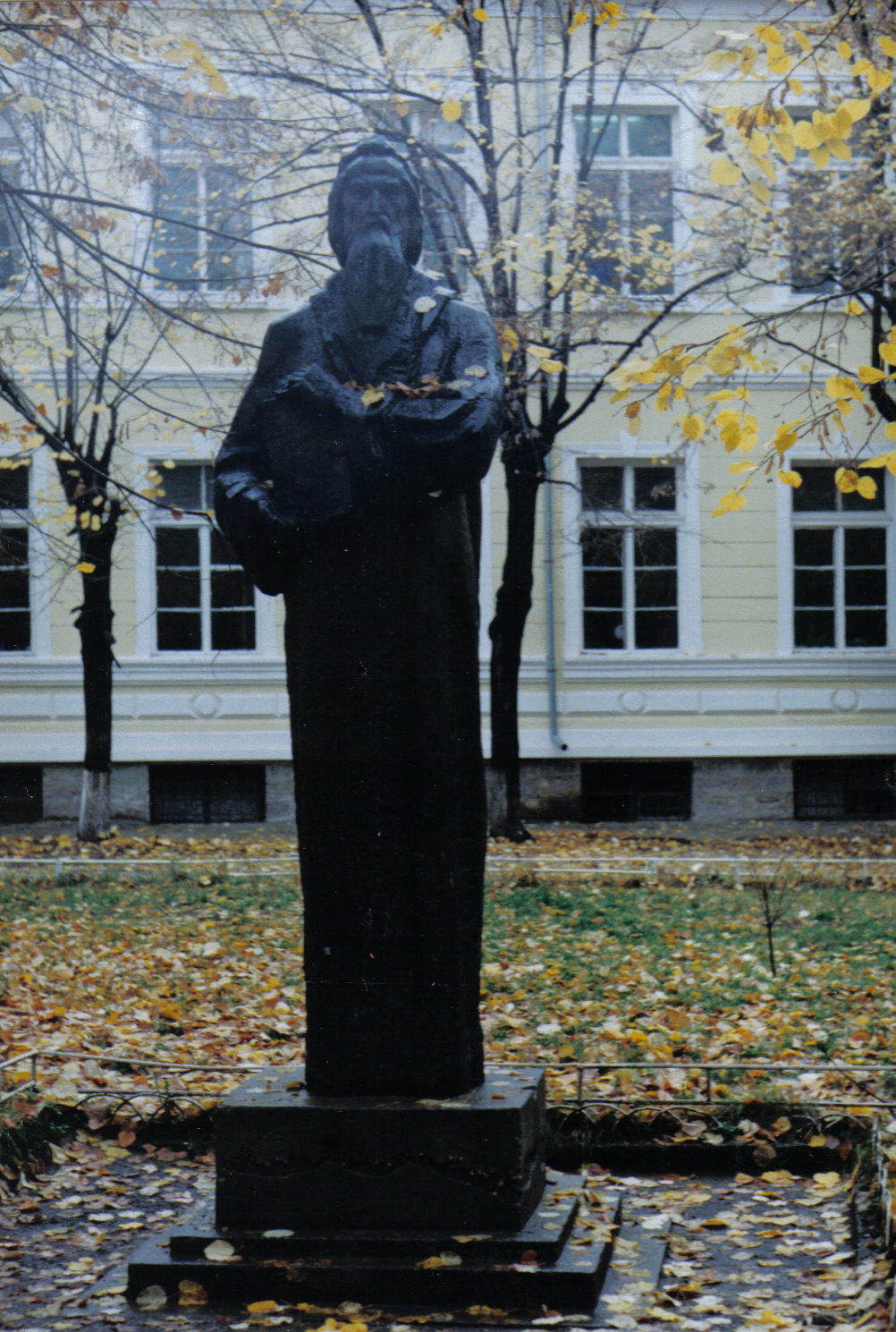 Паметник на ловешки книжовник